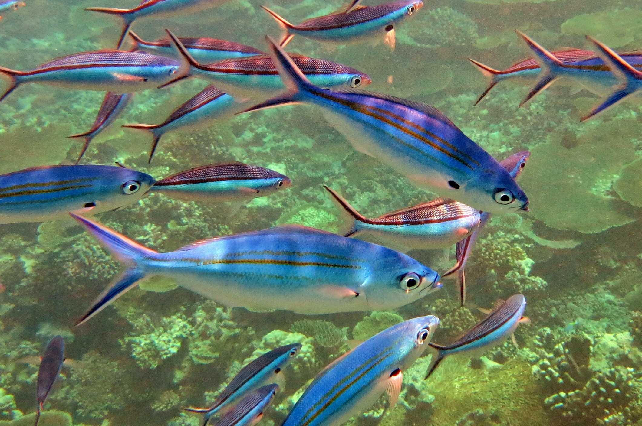 Un banc (mixte) de fusiliers à rayures variées (Caesio varilineata) aux Maldives (atoll de Baa).